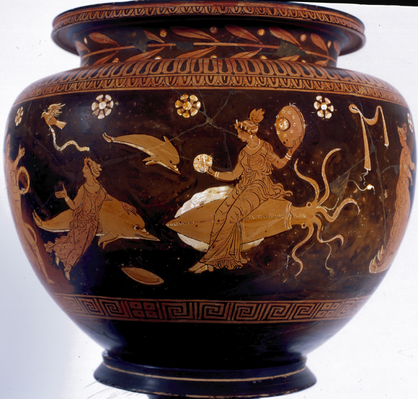 Dinos de Tetis y Peleo (Cultura Griega). Número de inventario: 2001-89-2.